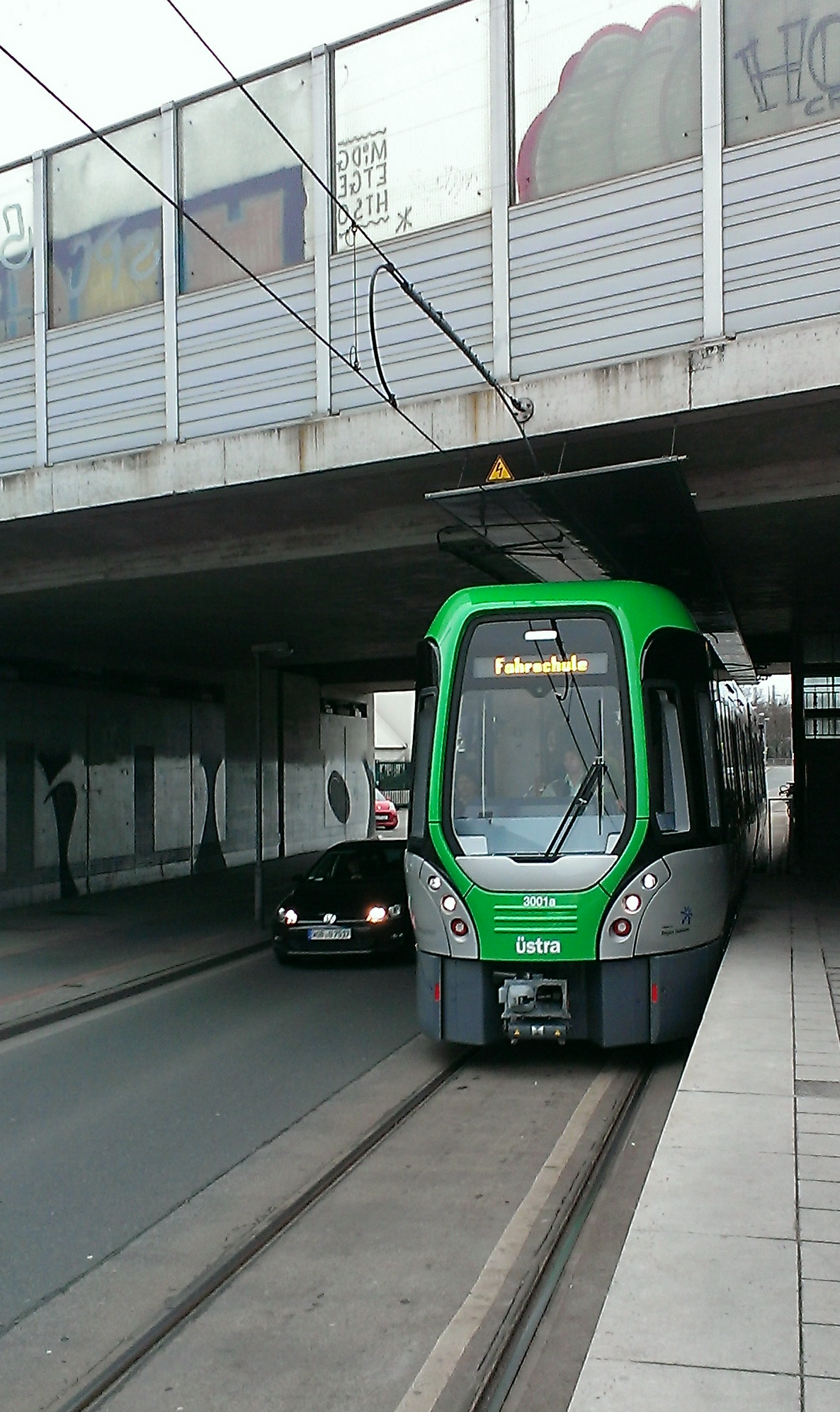 Stadtbahntriebwagen 3001 der Baureihe TW 3000 an der Haltestelle "Bahnhof Linden Fischerhof" in Hannover. (Etwa 50 bis 60 Meter über dem Meeresspiegel)